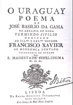 Capa do livro O Uraguai, do poeta Basílio da Gama.